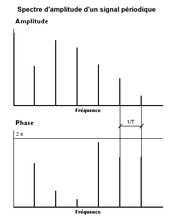 Spectre d'amplitude d'un signal périodique. Image personnelle. Domaine public.